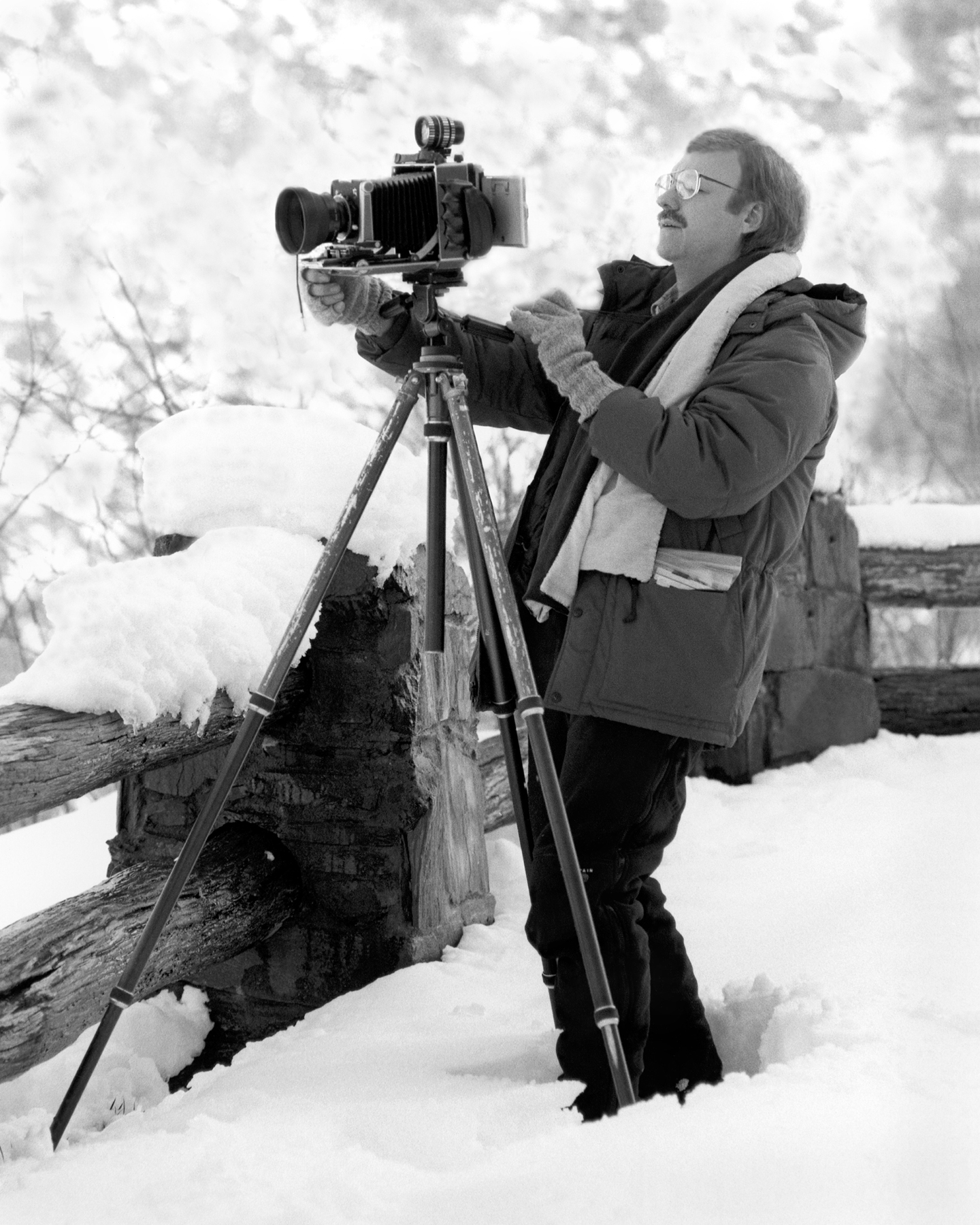 Timothy Lee Barnwell